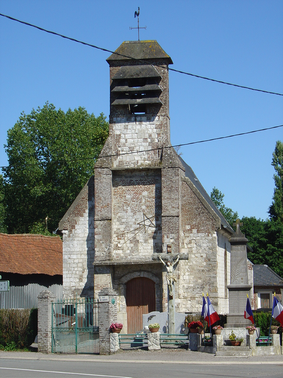 Église de Moncheaux-lès-Frévent